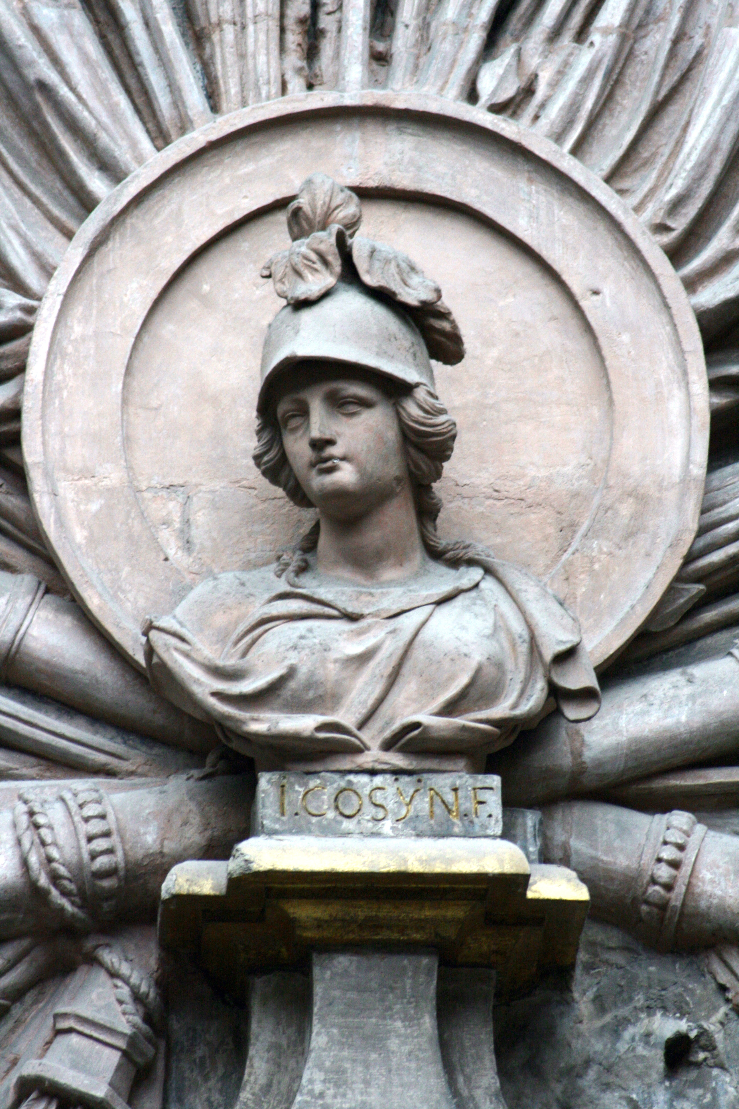 Rue de Flandre 46, Bruxelles, Belgique. Maison de la Bellone. Style baroque tardif. Buste de la Bellone avec le nom du sculpteur Jean Cosyn